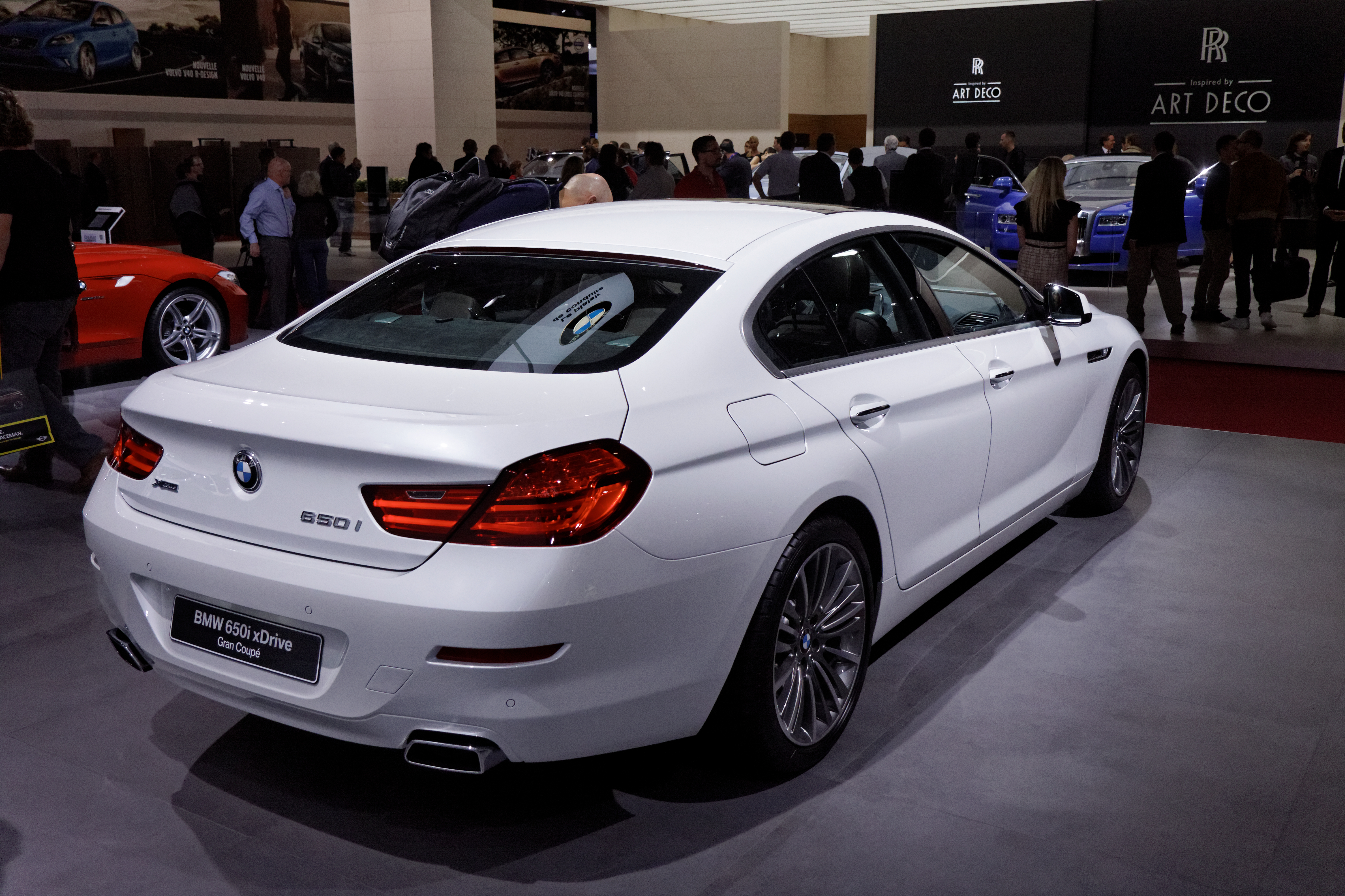 Une BMW 650i Xdrive présentée lors du Mondial de l'automobile de Paris 2012.